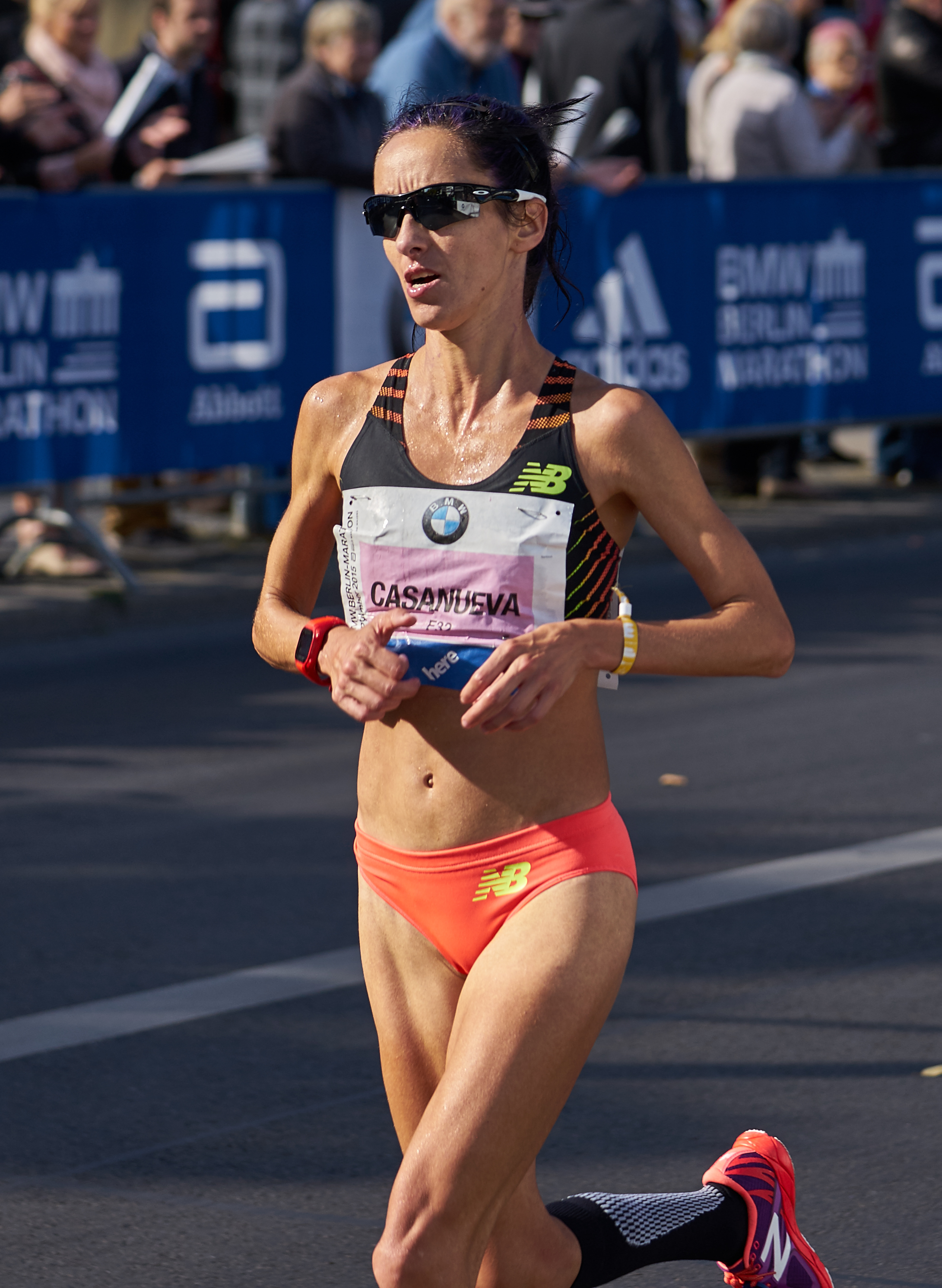 Berlin Marathon 2015 Casanueva, Marisa (ESP)